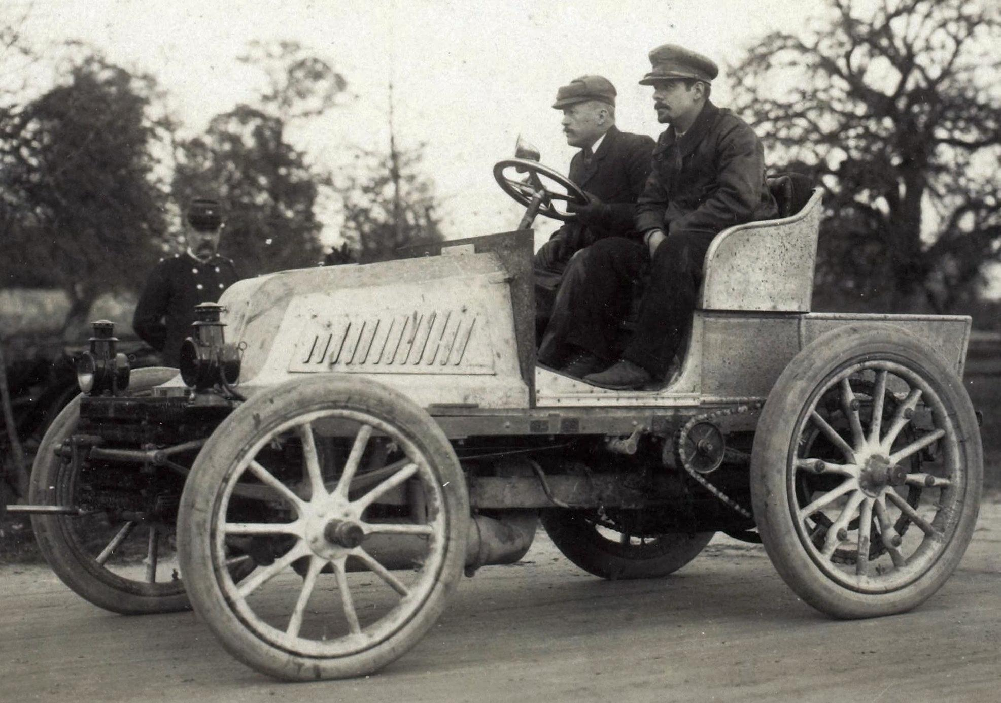 [Collection Jules Beau. Photographie sportive] : T. 12. Années 1899 et 1900 / Jules Beau : F. 36v. [Sur la côte de Saint-Barbe, Gaillon, 11 novembre 1900]